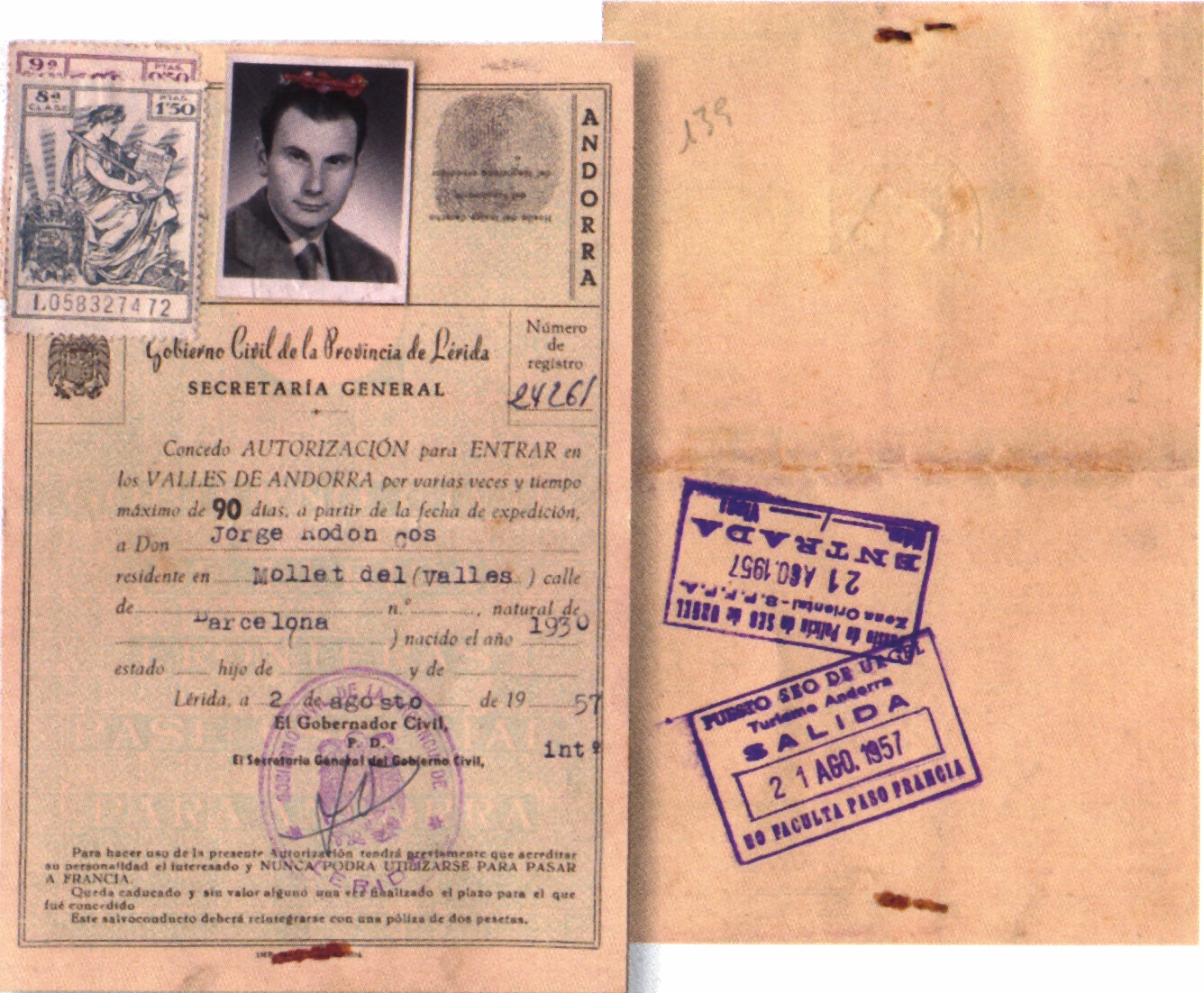 Spanischerseits erteilte Einreiseerlaubnis nach Andorra. Gültig für mehrere Aufenthalte von maximal 90 Tagen.